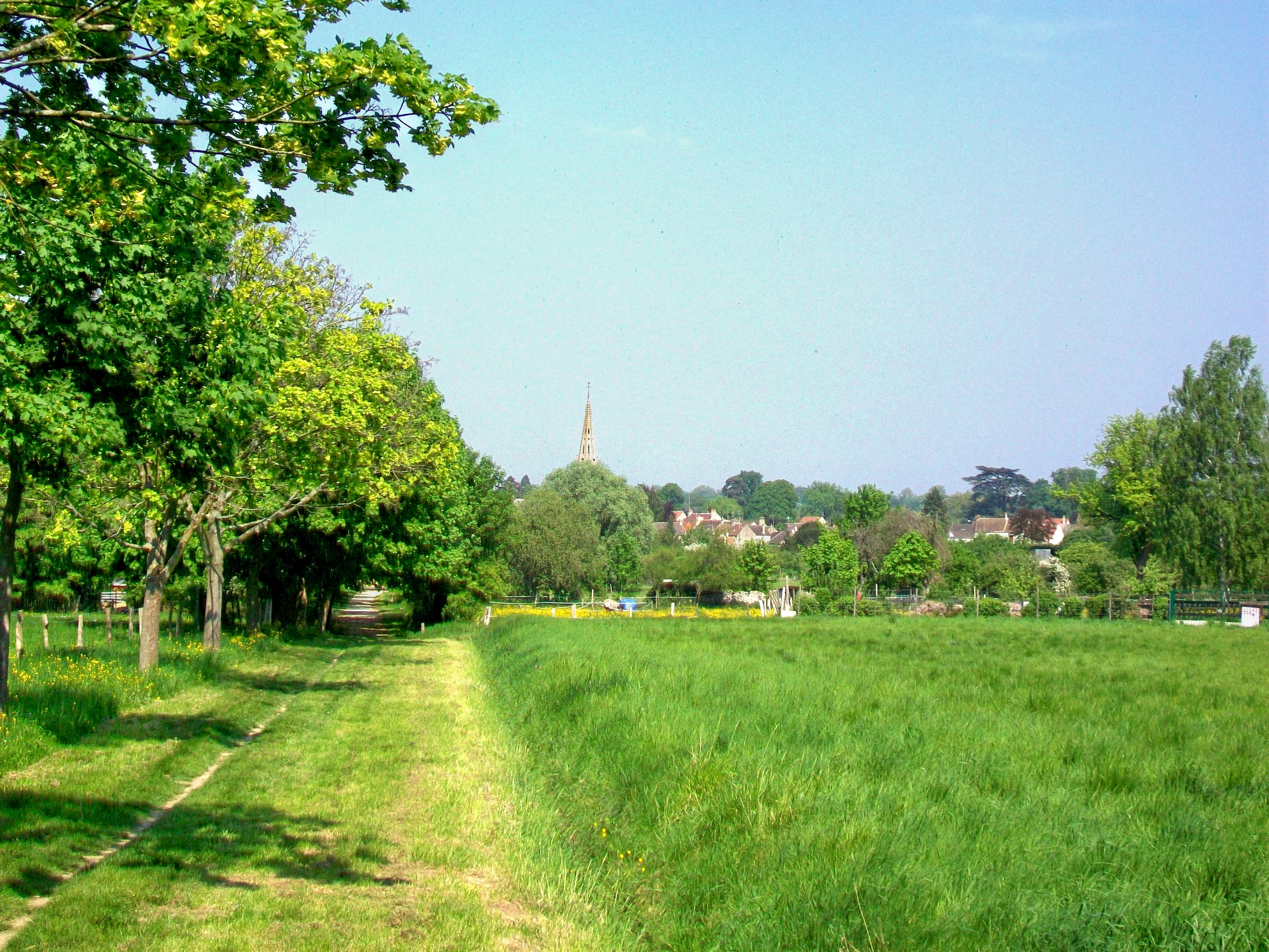 Le chemin rural n° 35 dit du pré d'Odan, qui est l'ancien tracé de la D 126 en direction de Saint-Witz au Paris. Ce chemin permet de rejoindre Saint-Witz à pied, en poursuivant sur le chemin rural n° 42, en ne marchant sur la route que pendant une centaine de mètres.